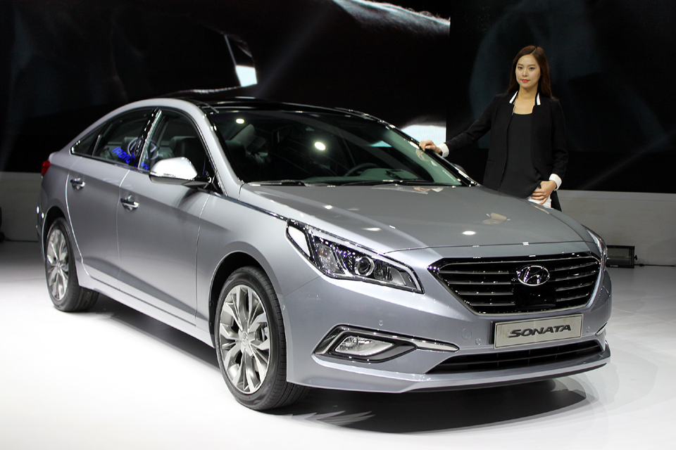 7세대 쏘나타(LF)